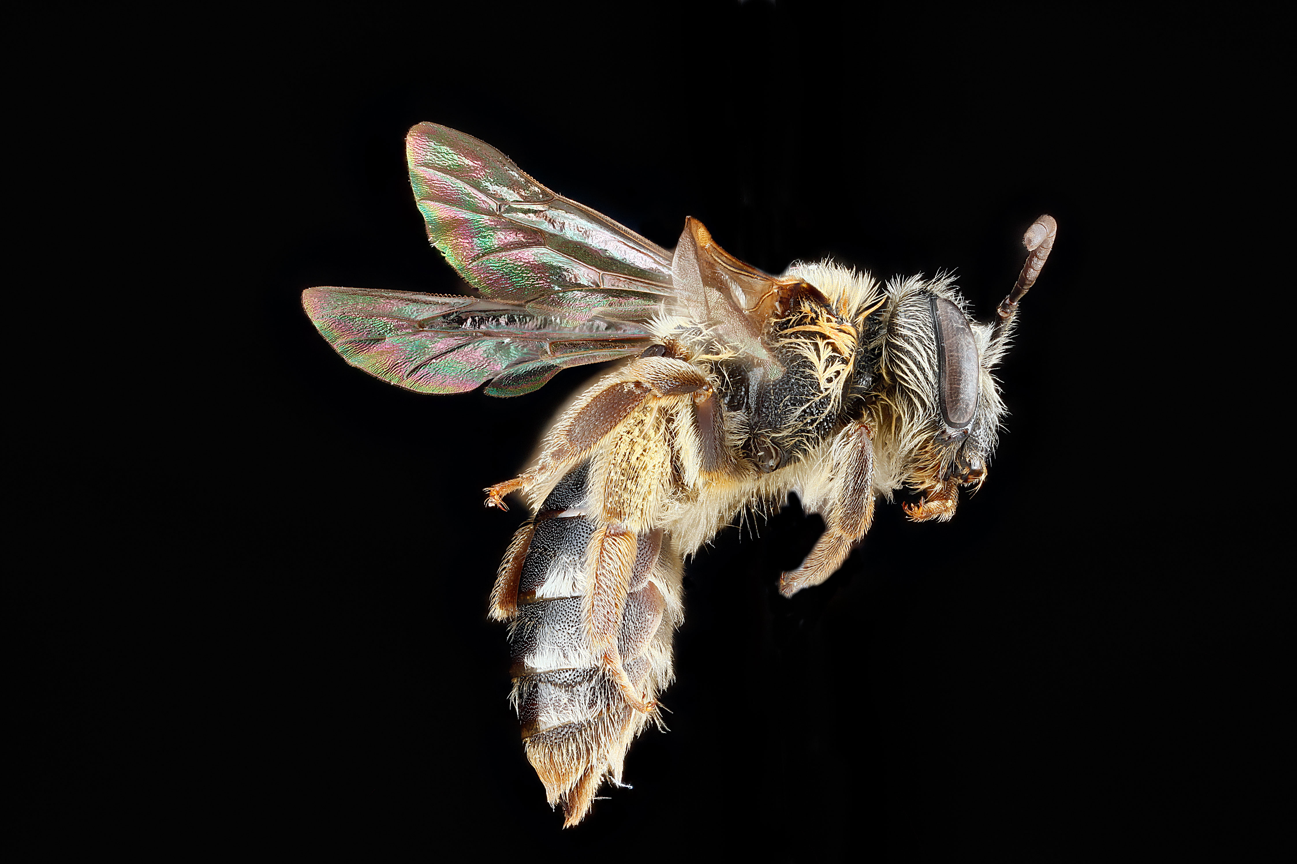 Andrena ceanothi, female